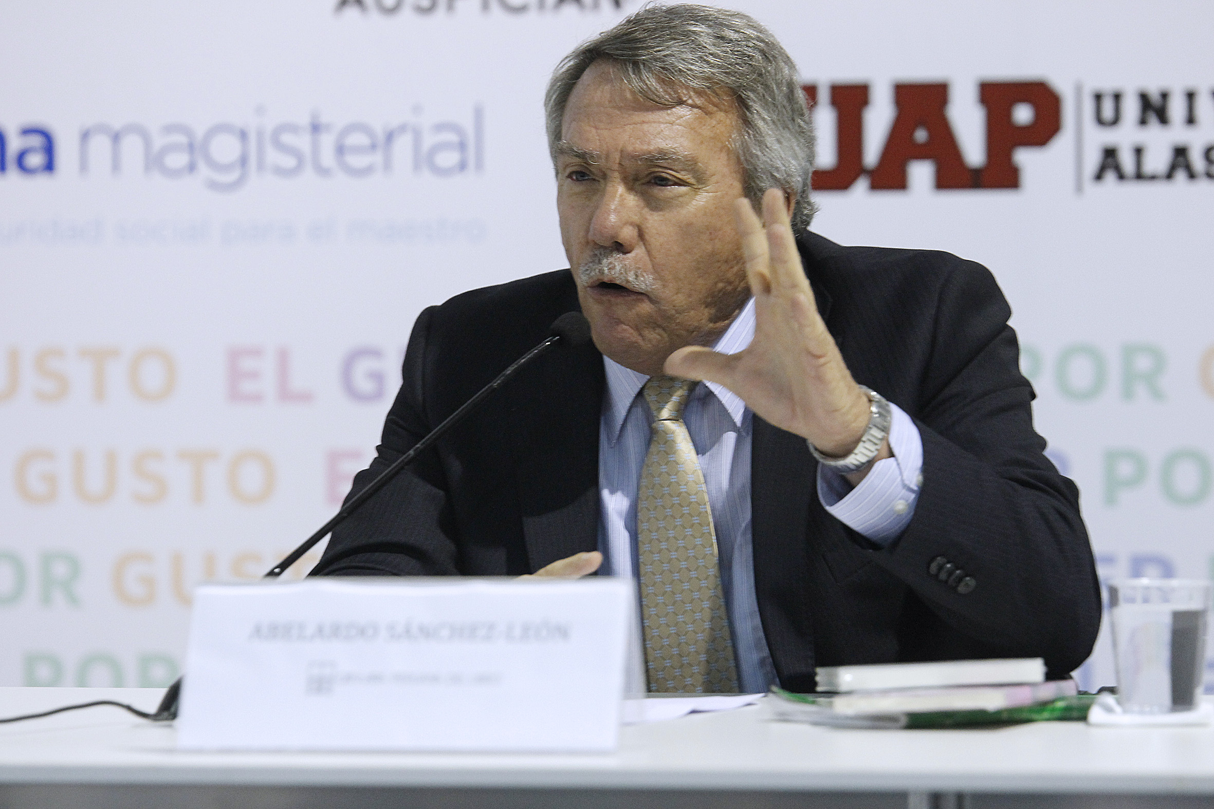 Abelardo Sánchez León en la Feria del Libro Ricardo Palma, 2015.